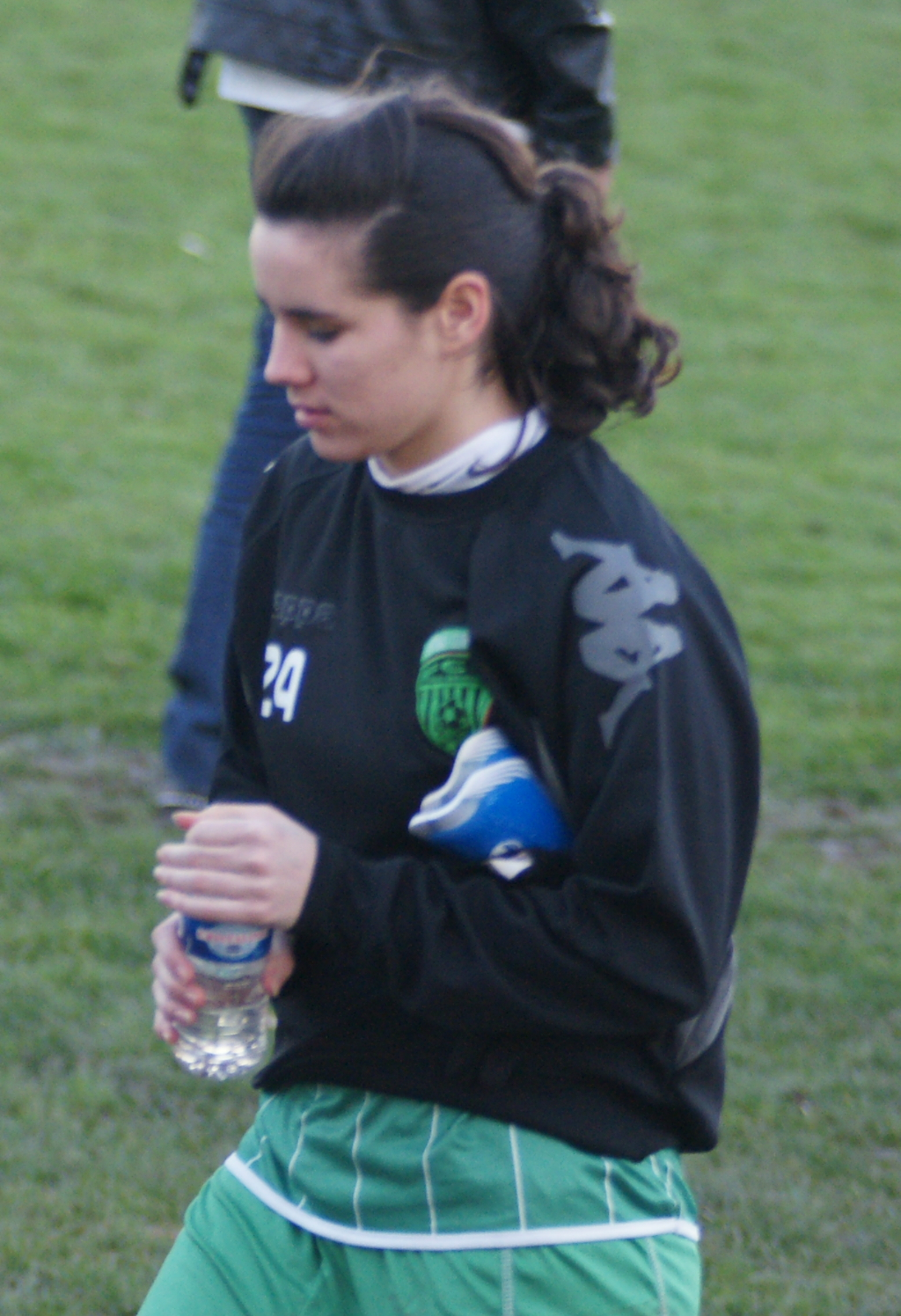 Photo de Célia Degorgue et Pauline Crammer, joueuse du Football Club féminin d'Hénin-Beaumont